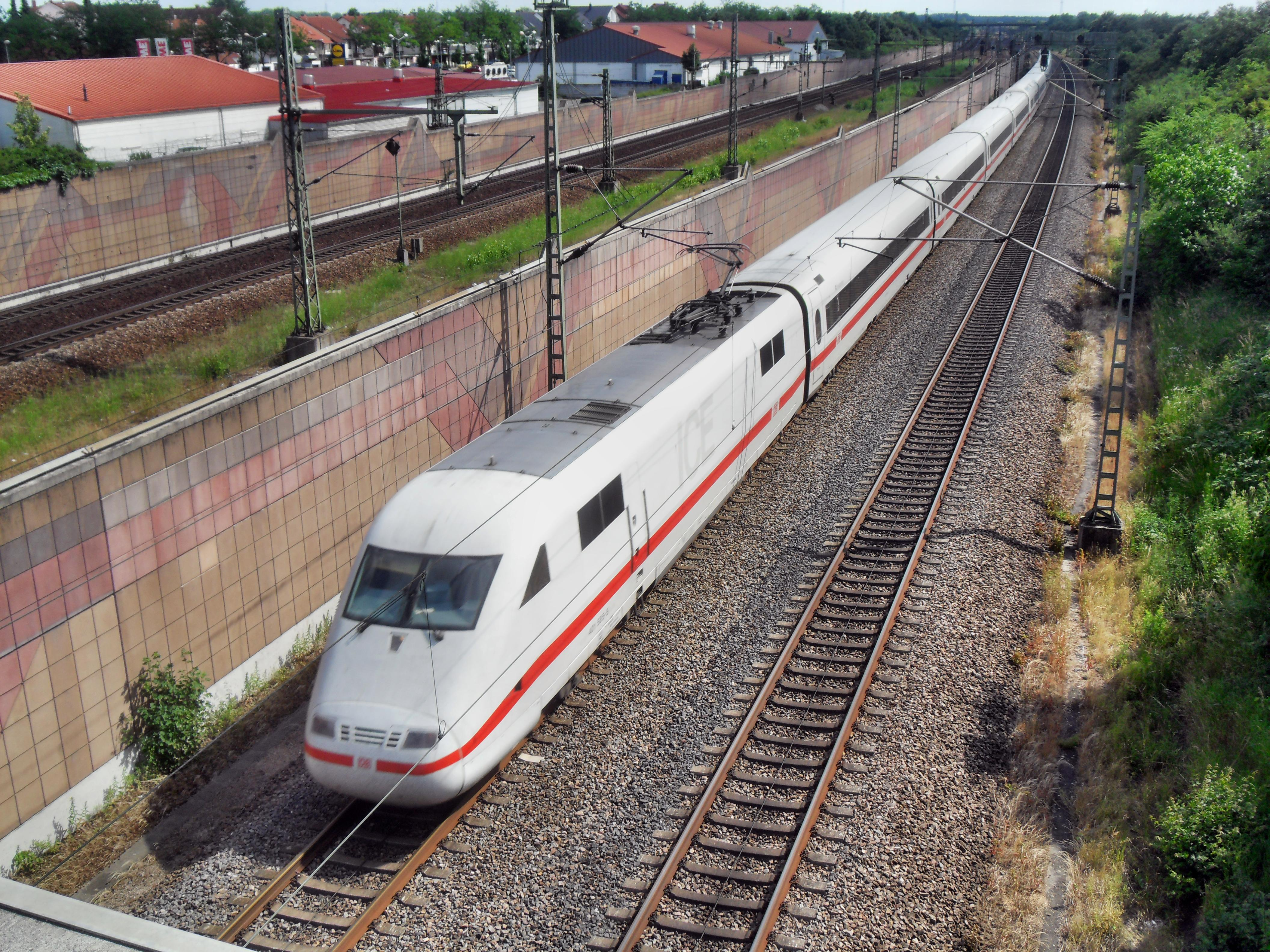 ICE auf der NBS Mannheim-Stuttgart auf dem Weg Richtung Mannheim, bei Hockenheim